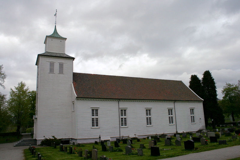 Høyland kirke, Sandnes, Rogaland